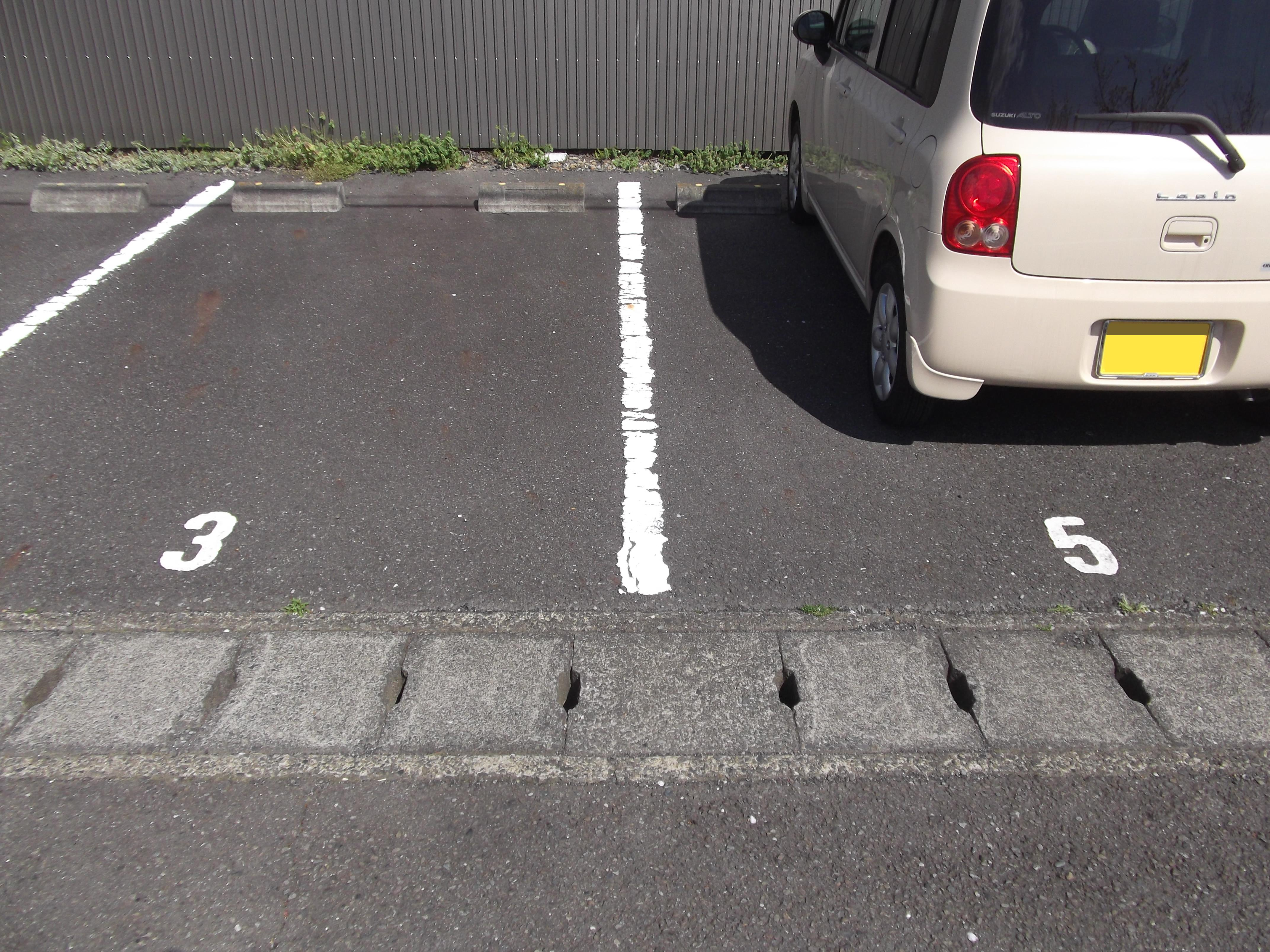 静岡市駿河区小鹿にある、とある駐車場は、4番を飛ばしている。